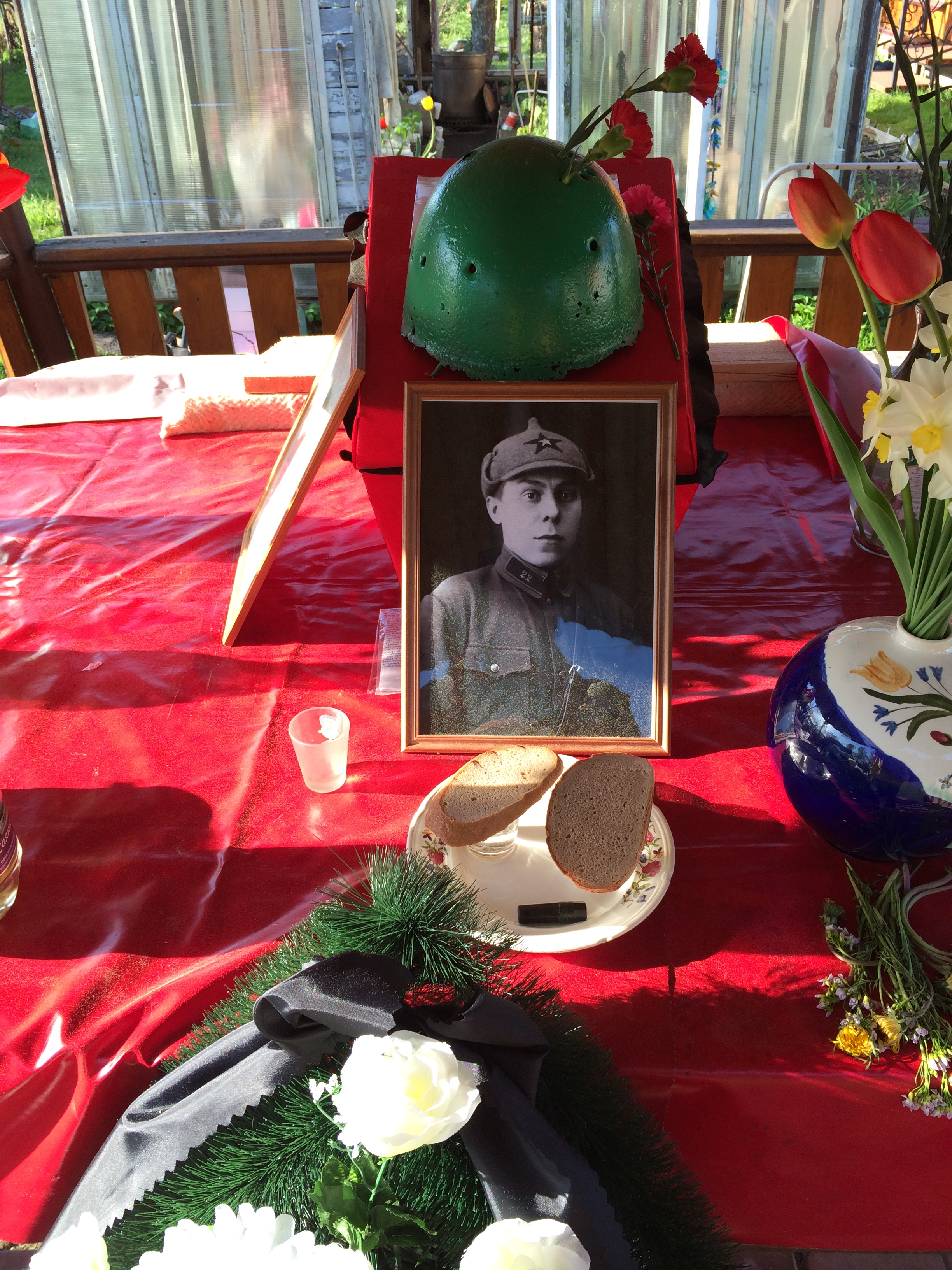 Шевяков Пётр Павлович - боец 1 Отдельной горно-стрелковой бригады (3 стр. б-он, предположительно). Пропал без вести в августе 1941 года. Найден поисковиками Новгородского отряда "Долина" в мае 2014 года. Предположительно погиб 10 августа 1941 года на берегу реки Мшага, напротив деревни Костково.